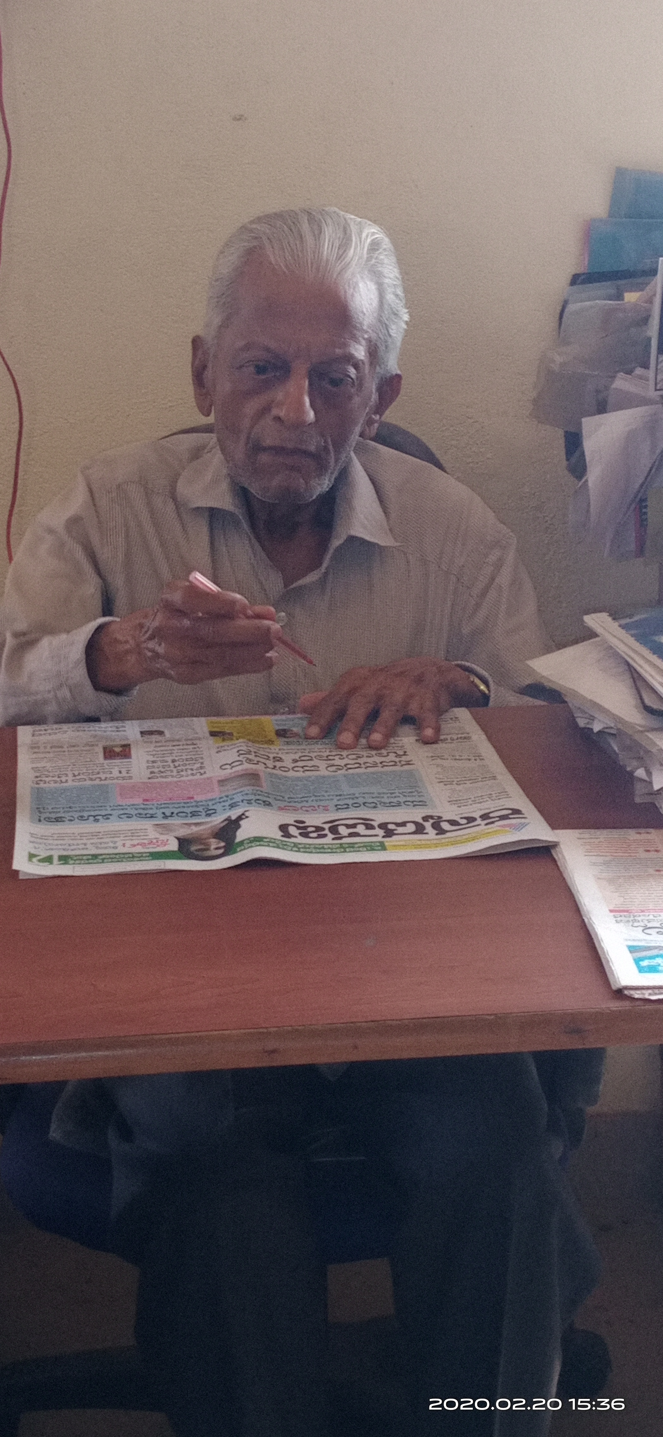 ಕನ್ನಡ: ಶ್ರೀಕರ. ಎಲ್. ಭಂಡಾರಕರ್